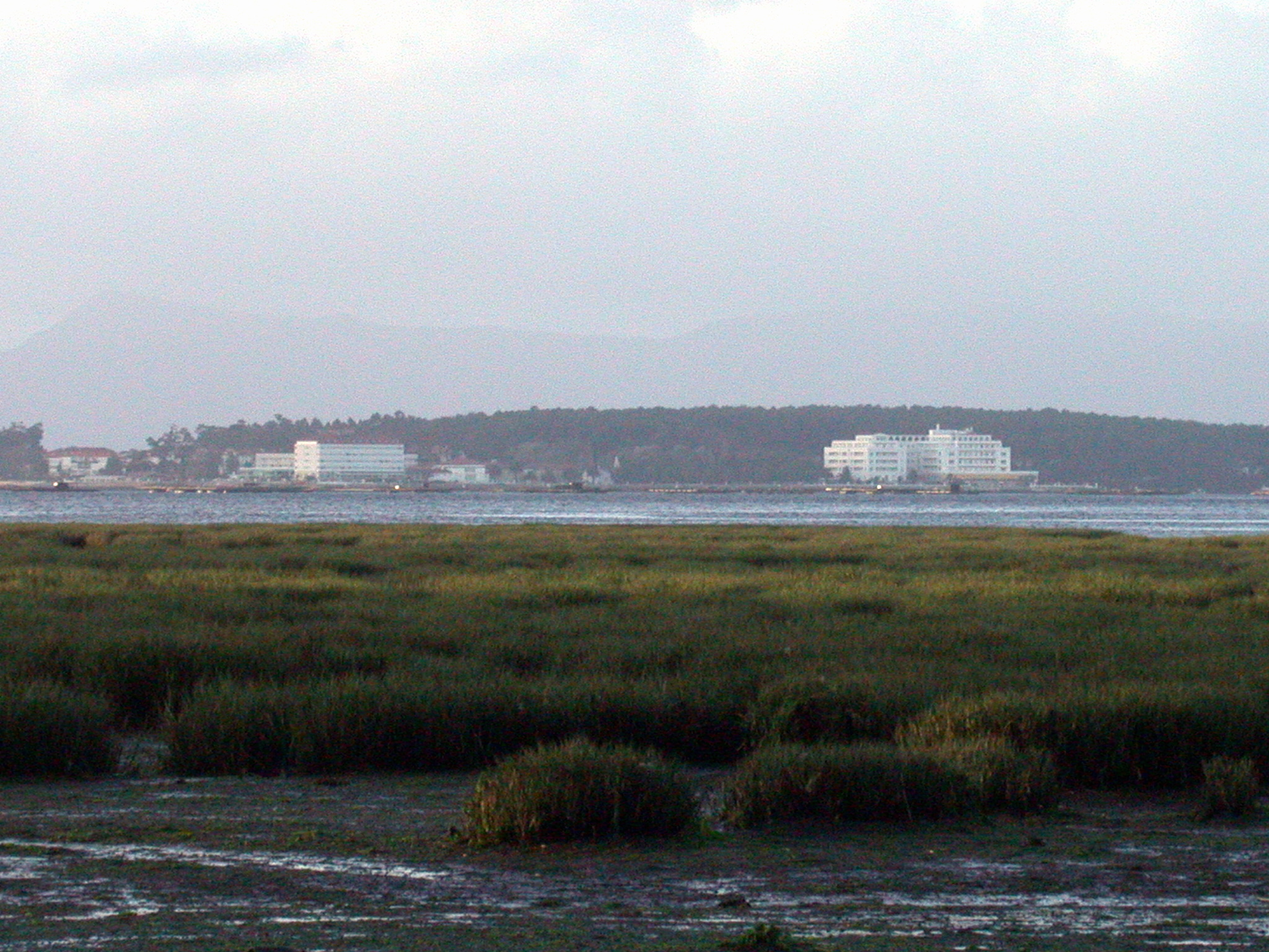 A Toxa e marismas de Dena